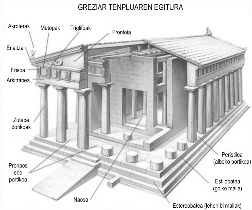 Greziar tenpluaren egitura arkitektonikoa